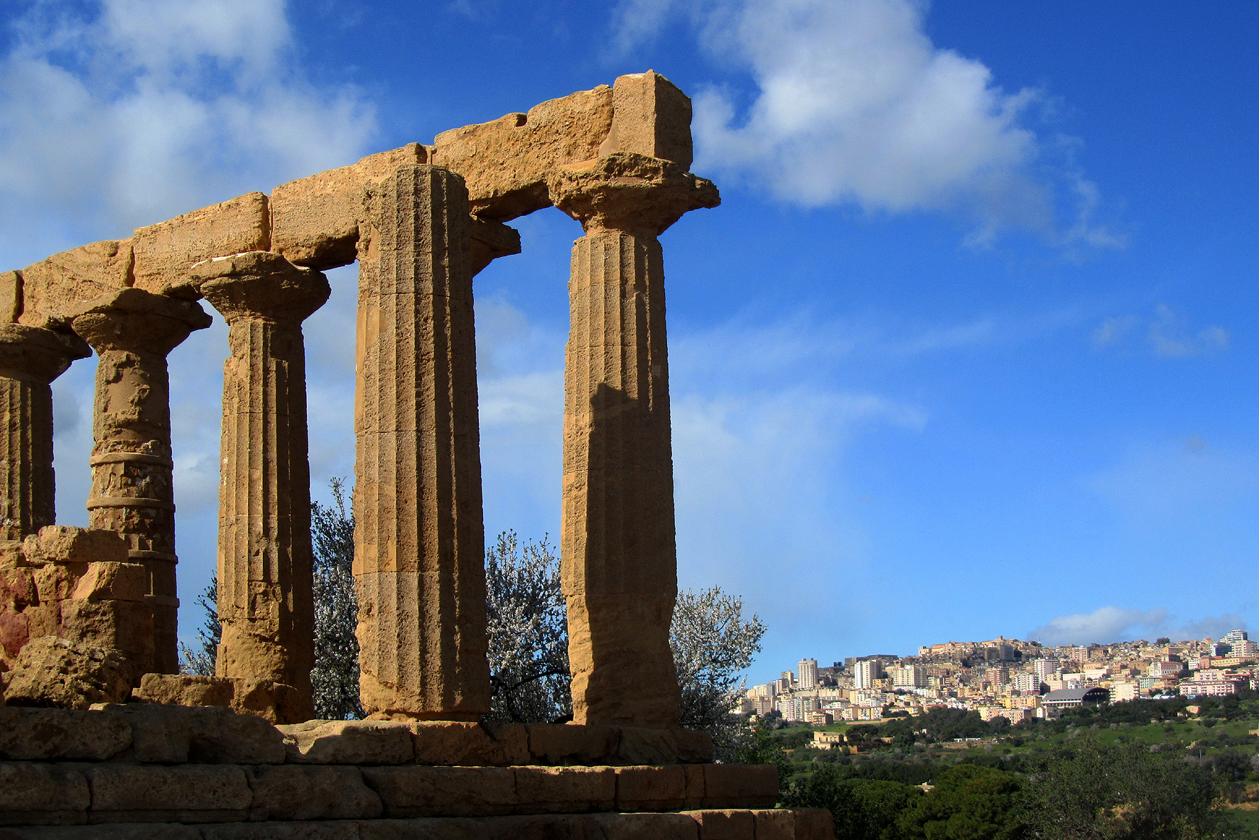 Heratempel, auch Tempel der Hera Lakinia (oder Iuno Lacinia) genannt. Es ist jedoch unbekannt, welcher Gottheit der Tempel tatsächlich gewidmet war.